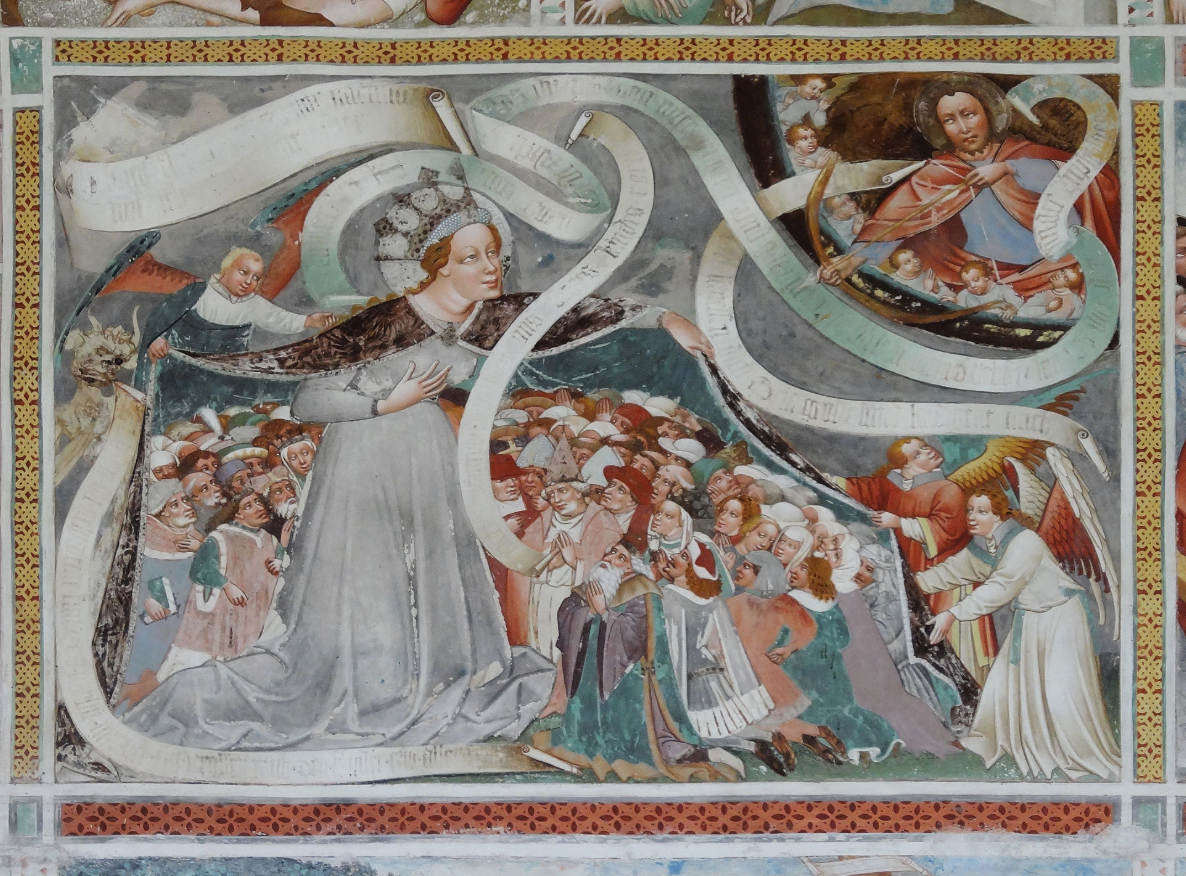 Kath. Filialkirche Hl. Georg in Gerlamoos (Steinfeld), Schutzmantelmadonna, Fresko von Thomas von Villach